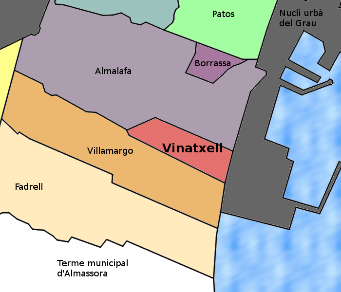 Cròquis de la situació de la Partida de Vinatxell al Terme Municipal de Castelló de La Plana.